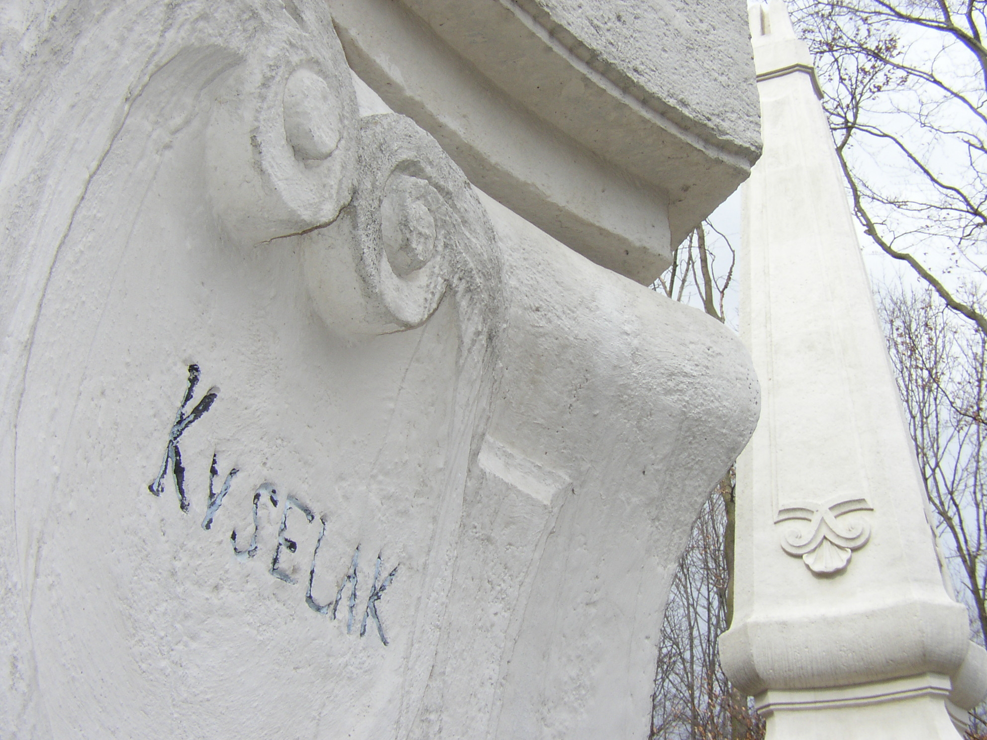 KYSELAK erhaltene Signatur am Obelisk im Schwarzenbergpark